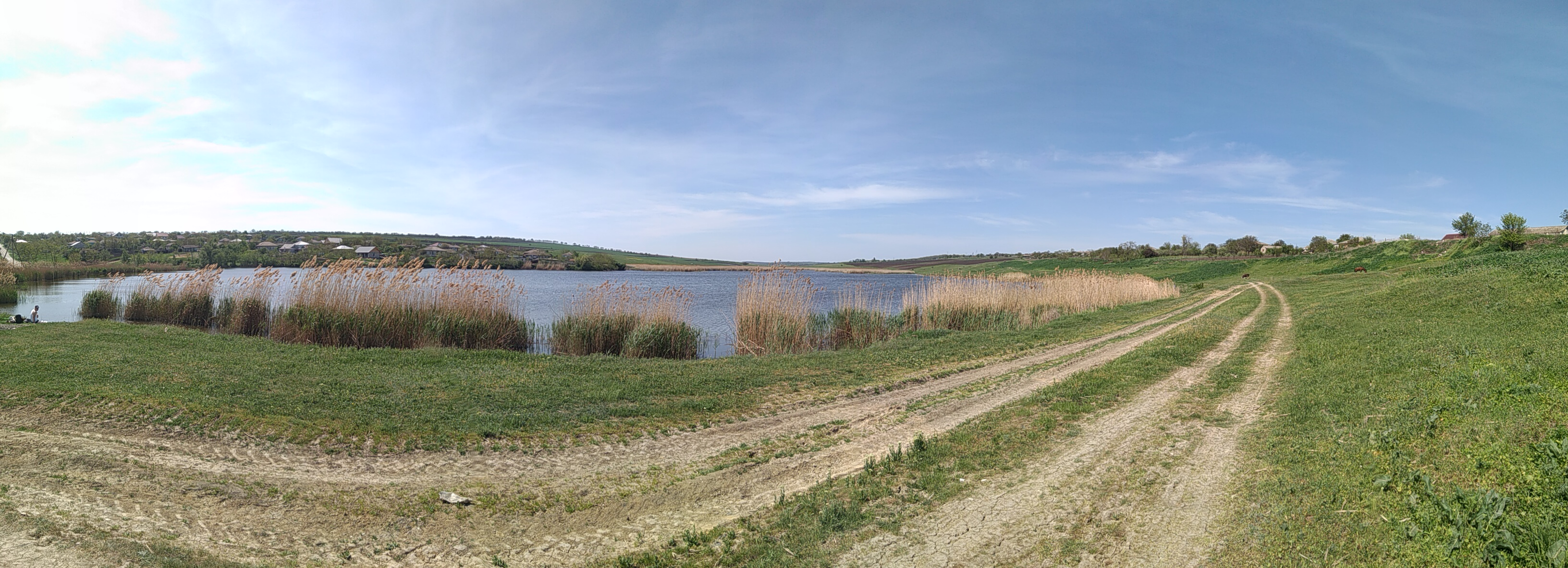 Ecosistemul acvatic „La Moară”, monument al naturii amplasat în raionul Rîșcani, la vest de satul Recea (cod MD-RS-mn.B-023) B-023